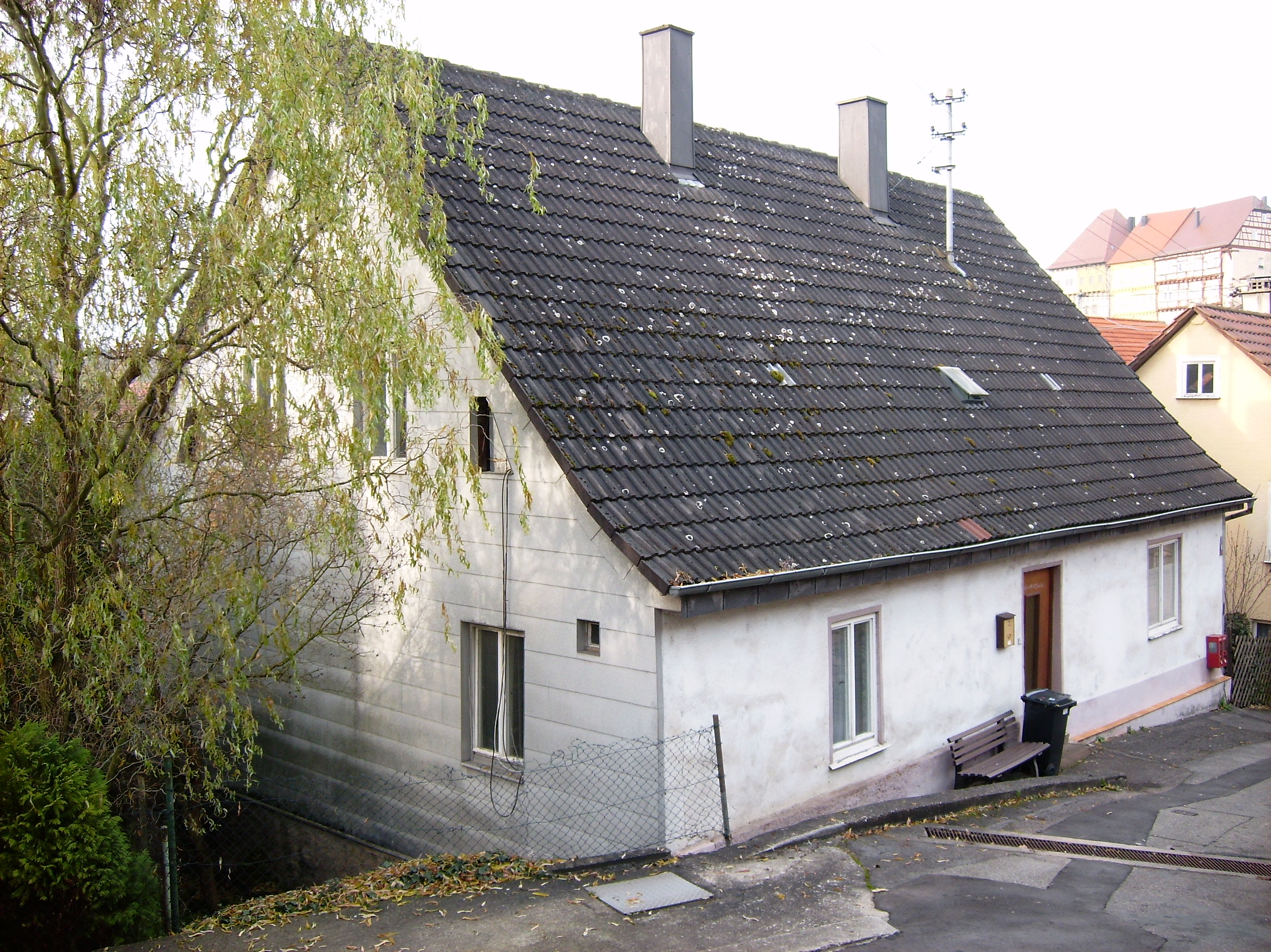 Ehemalige jüdische Schule in der Langen Gasse 5 in Talheim (Landkreis Heilbronn).